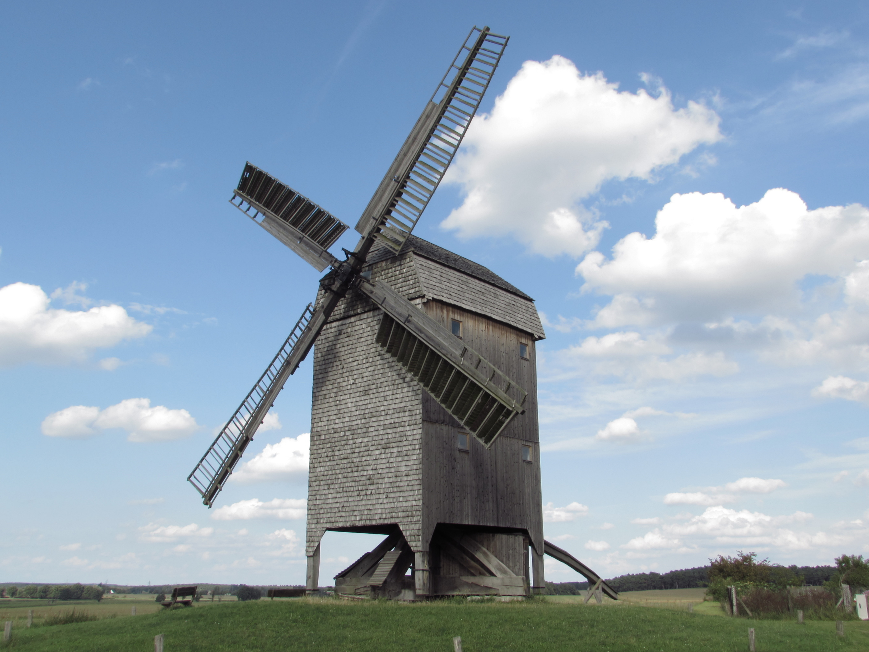 bockwindmühl ketzür